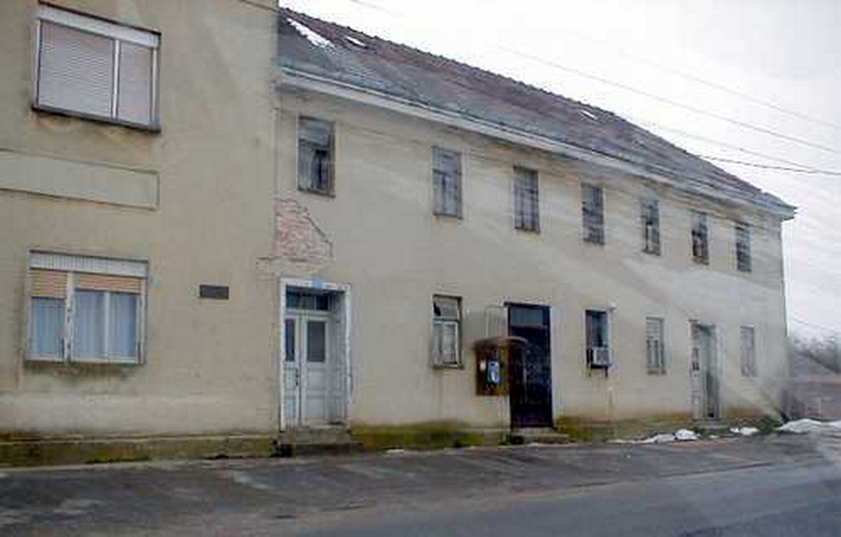 Banovo - Dom